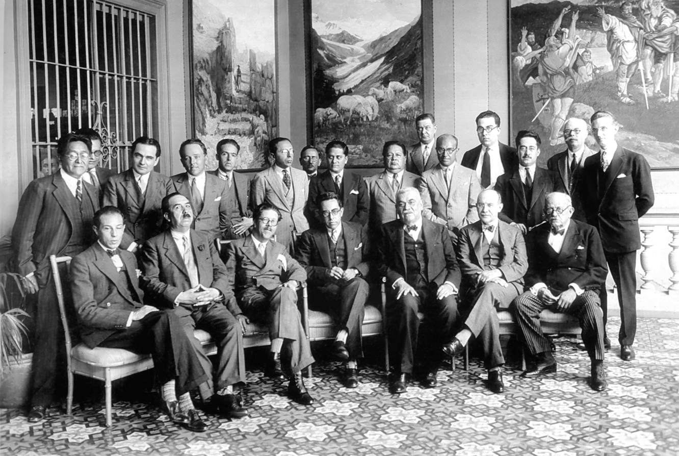 Sanmarquinos ilustres (en humanidades y ciencias sociales) de inicios del siglo XX: Mariano Iberico, Horacio Urteaga, José Gálvez, Carlos Wiesse, Julio C. Tello, Jorge Basadre, Raúl Porras Barrenechea, Carlos Rodríguez Pastor, Ricardo Bustamante Cisneros, Manuel Abastos, Juan Bautista de Lavalle, Luis Alberto Sánchez, Víctor Belaúnde, Francisco García Calderón, Alejandro Deustua, Luis Valcárcel, entre otros.